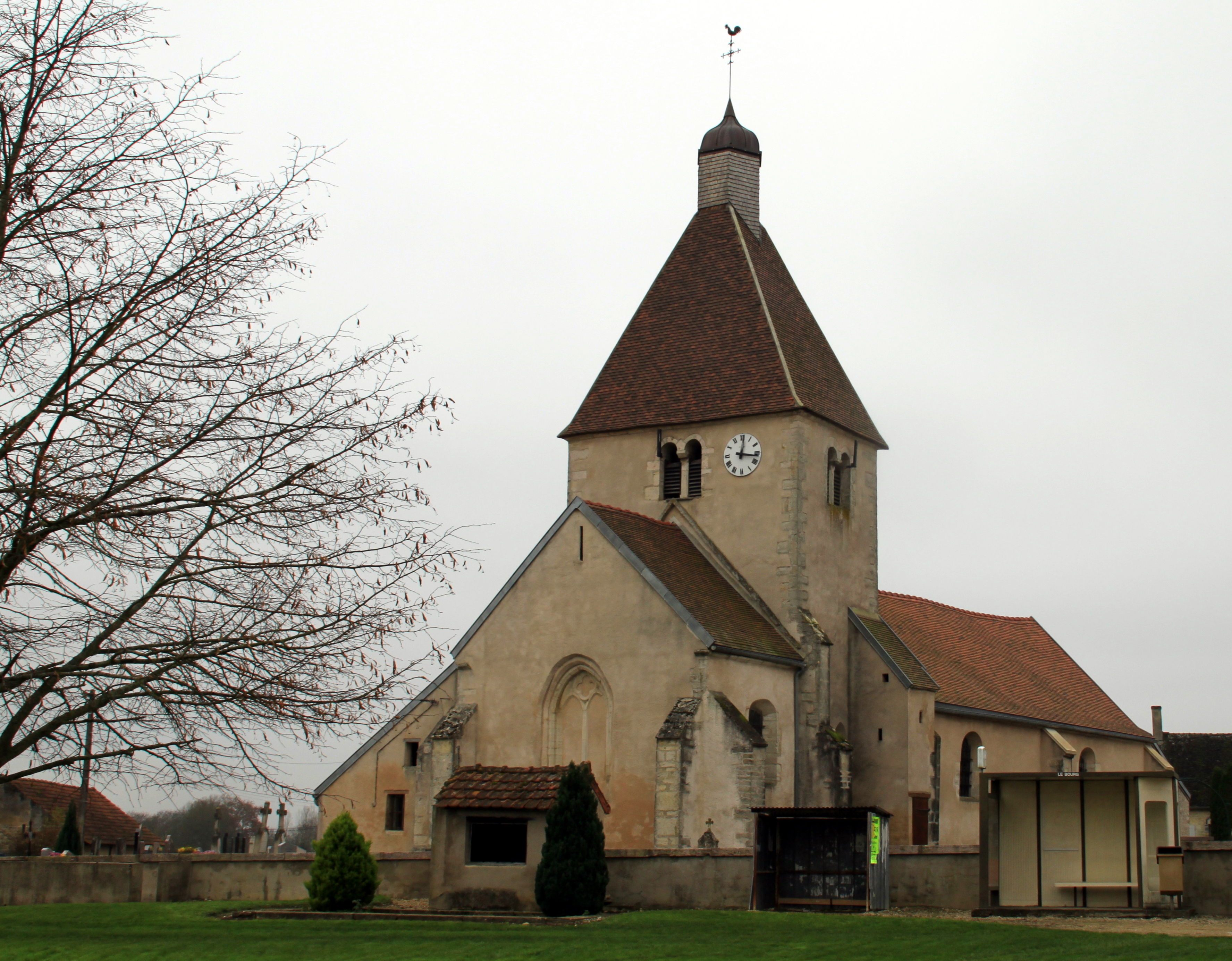 Kirche von Pourlans (Saône-et-Loire)